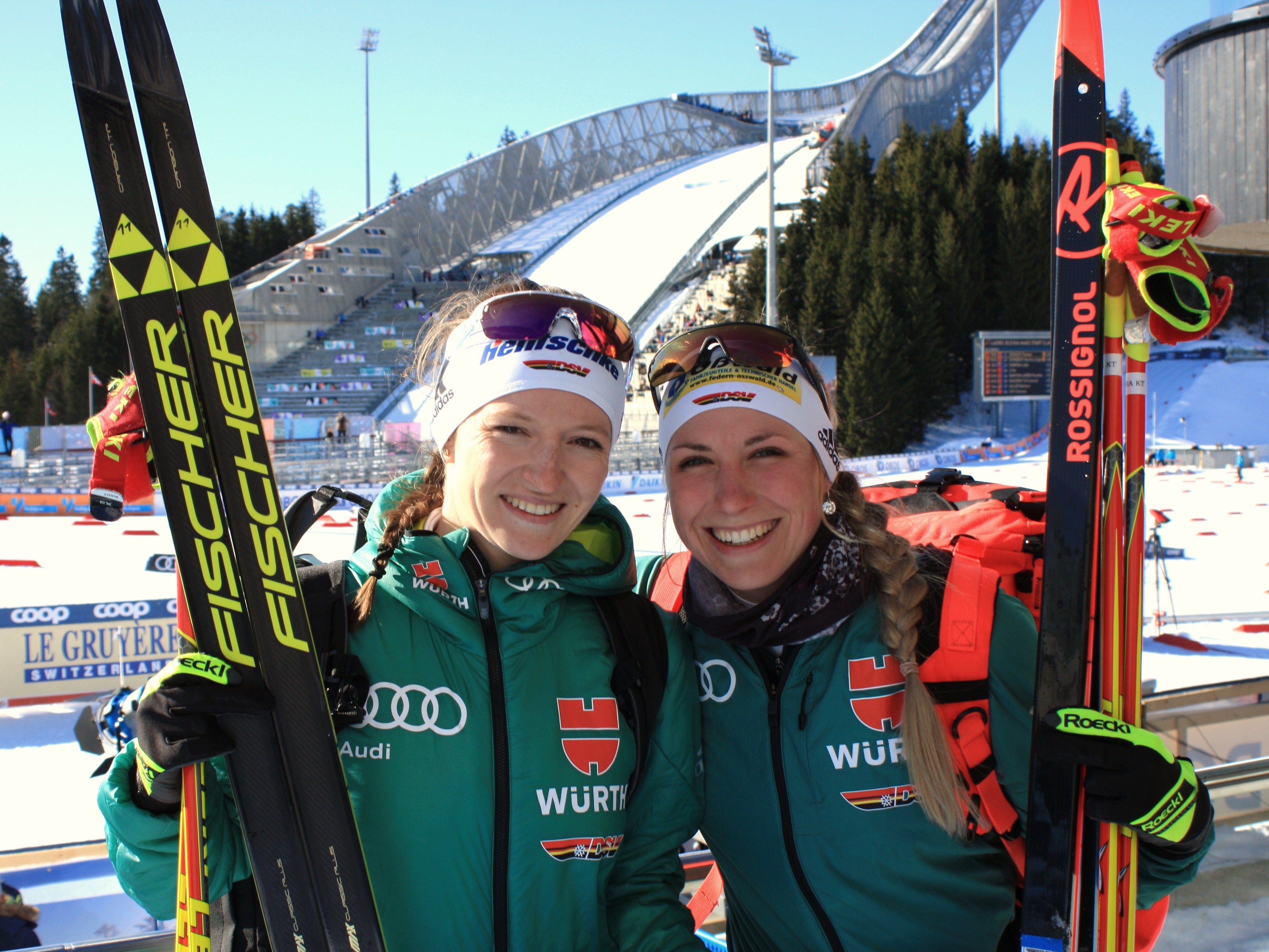 Antonia Fräbel (rechts) mit Julia Belger am Holmenkollen, 10.03.2019